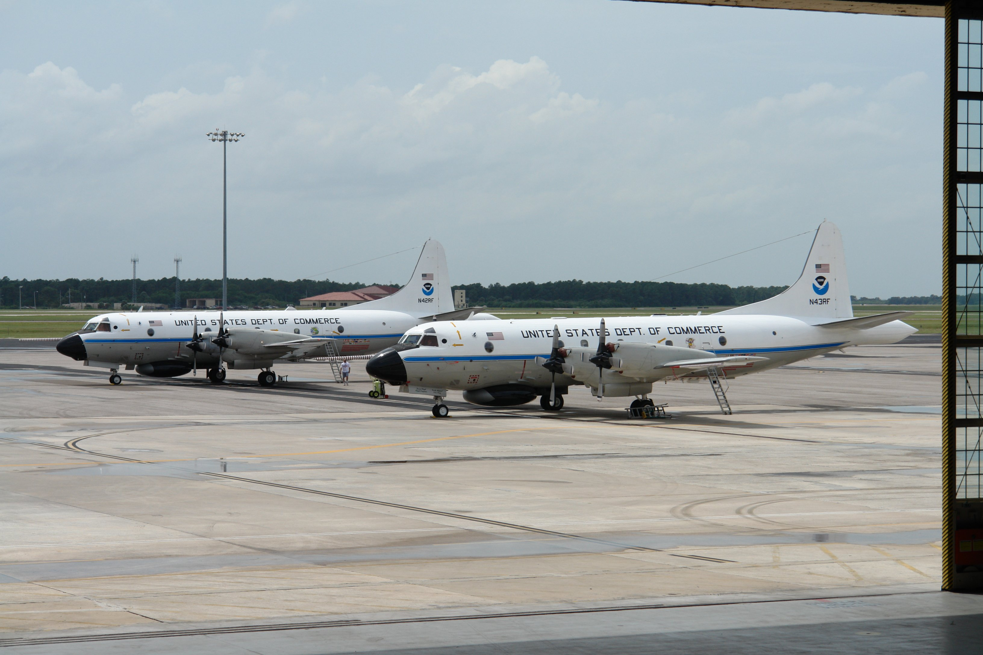 fly01002